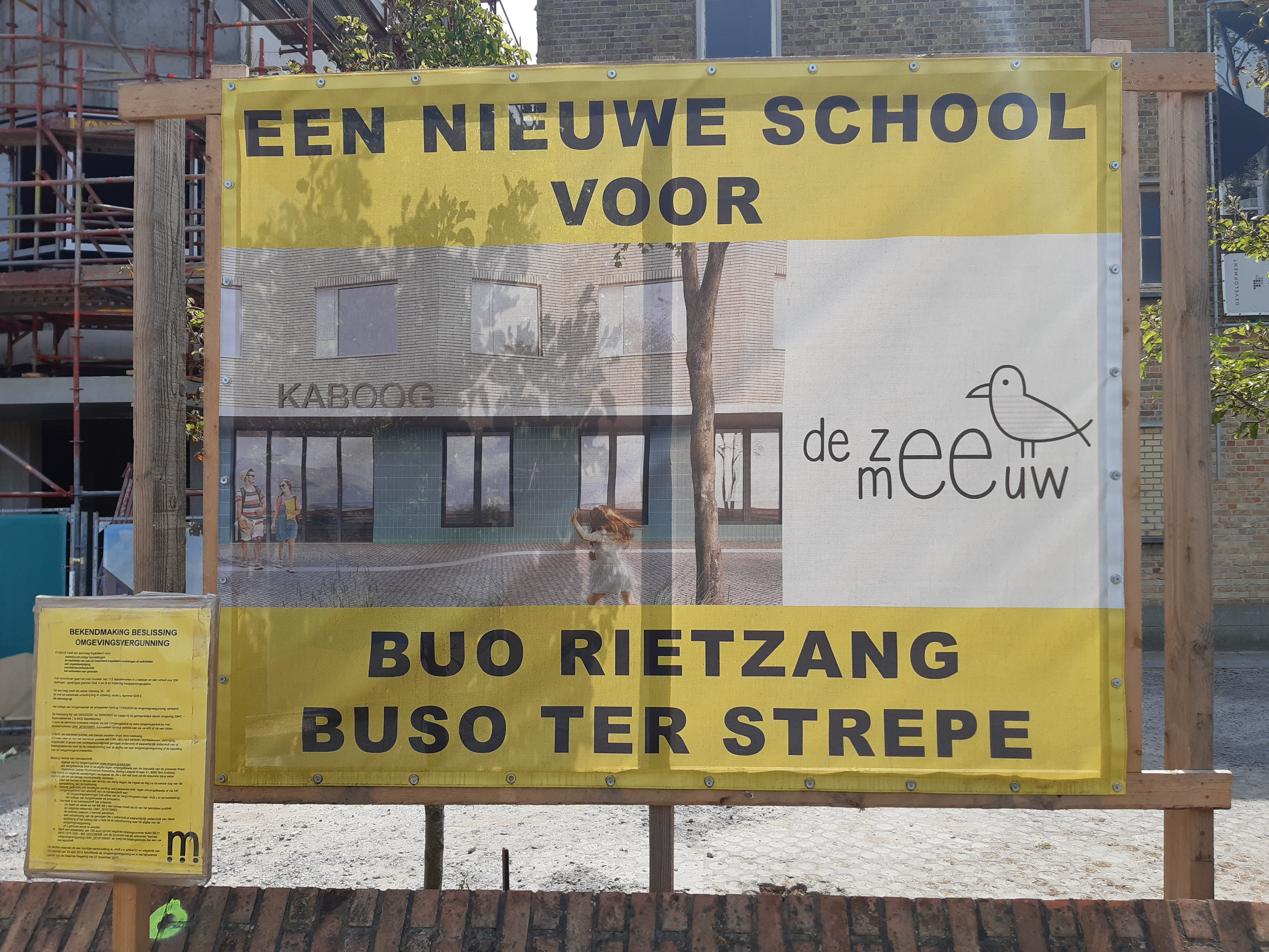 Nieuw gebouw Kaboog